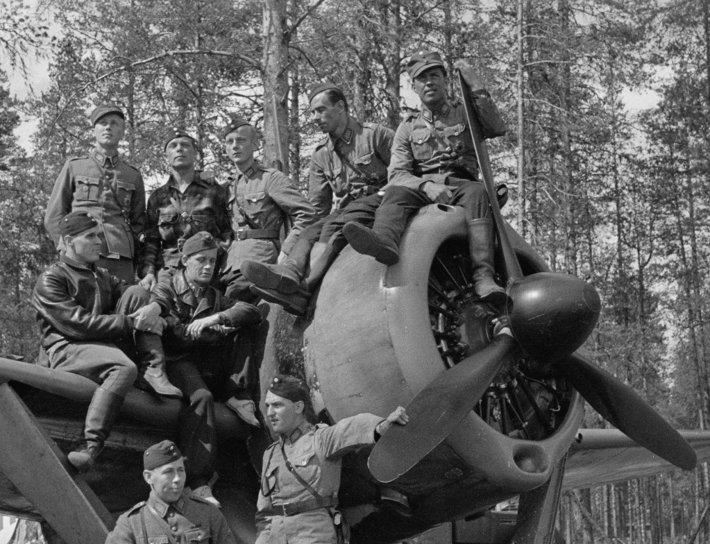 Kapteeni Aholan voitokkaan lentueen miehiä koneensa ympärillä Tiiksjärvellä. Ylimmässä rivissä: Paavo Koskela, Eero Kinnunen, Heimo Lampi, Eino Peltola ja Urho Lehto. Keskellä Väinö Pokela ja Lauri Pekuri (Ohukainen). Edessä Sulo Lehtiö ja Osmo Lehtinen. 2/Lentolaivue 24.